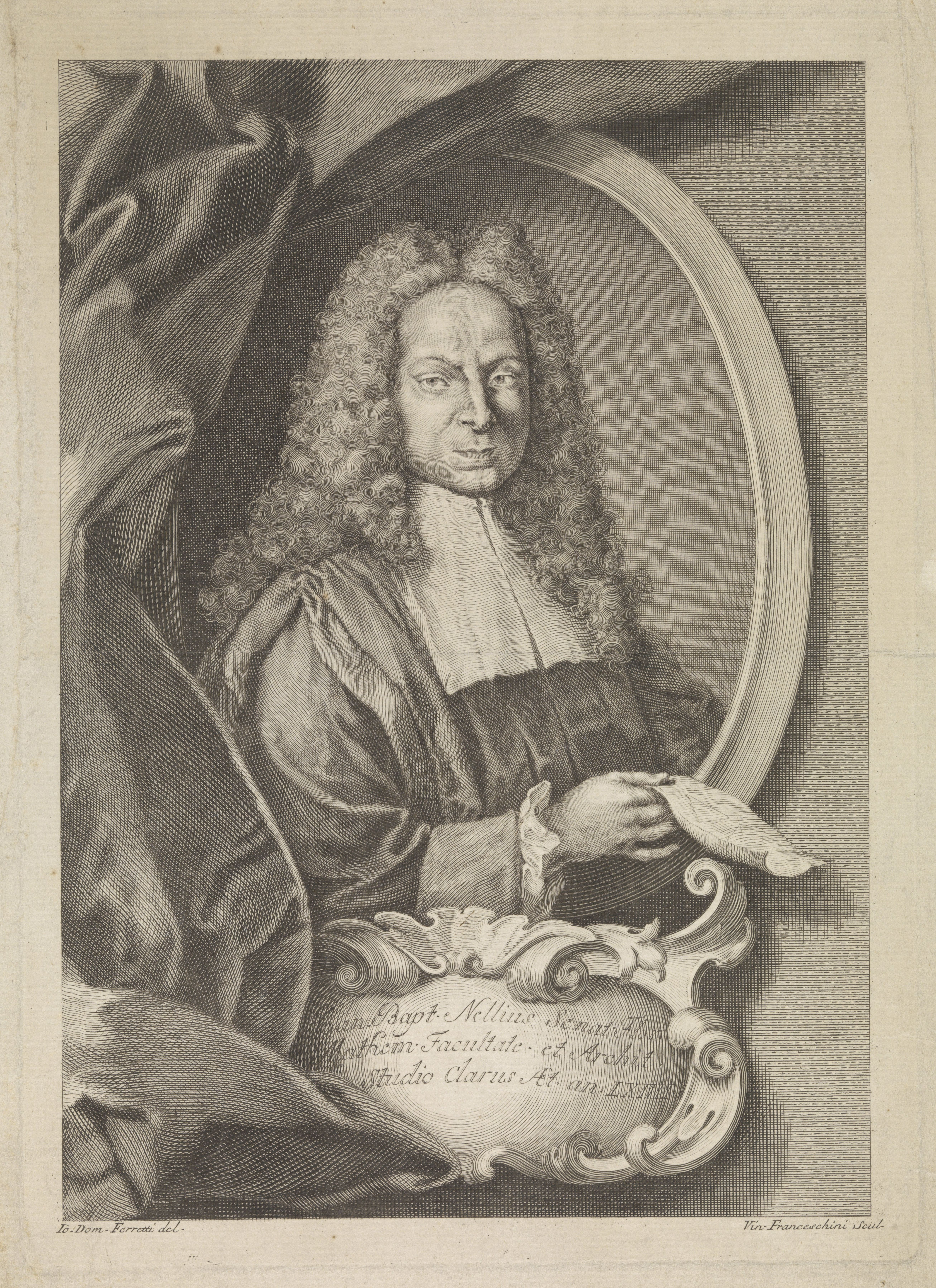 IdentificatieTitel(s): Portret van architect Giovanni Battista NelliObjecttype: prent Objectnummer: RP-P-1909-4926Opschriften / Merken: verzamelaarsmerk, verso, gestempeld: Lugt 2228VervaardigingVervaardiger: prentmaker: Vincenzo Franceschini (vermeld op object)naar tekening van: Giovanni Domenico Ferretti (vermeld op object)Plaats vervaardiging: ItaliëDatering: 1690 - 1750Fysieke kenmerken: gravureMateriaal: papier Techniek: graveren (drukprocedé)Afmetingen: plaatrand: h 330 mm × b 237 mmOnderwerpWat: historical personsportrait, self-portrait of architectWie: Giovanni Battista NelliVerwerving en rechtenVerwerving: aankoop 1905Copyright: Publiek domein